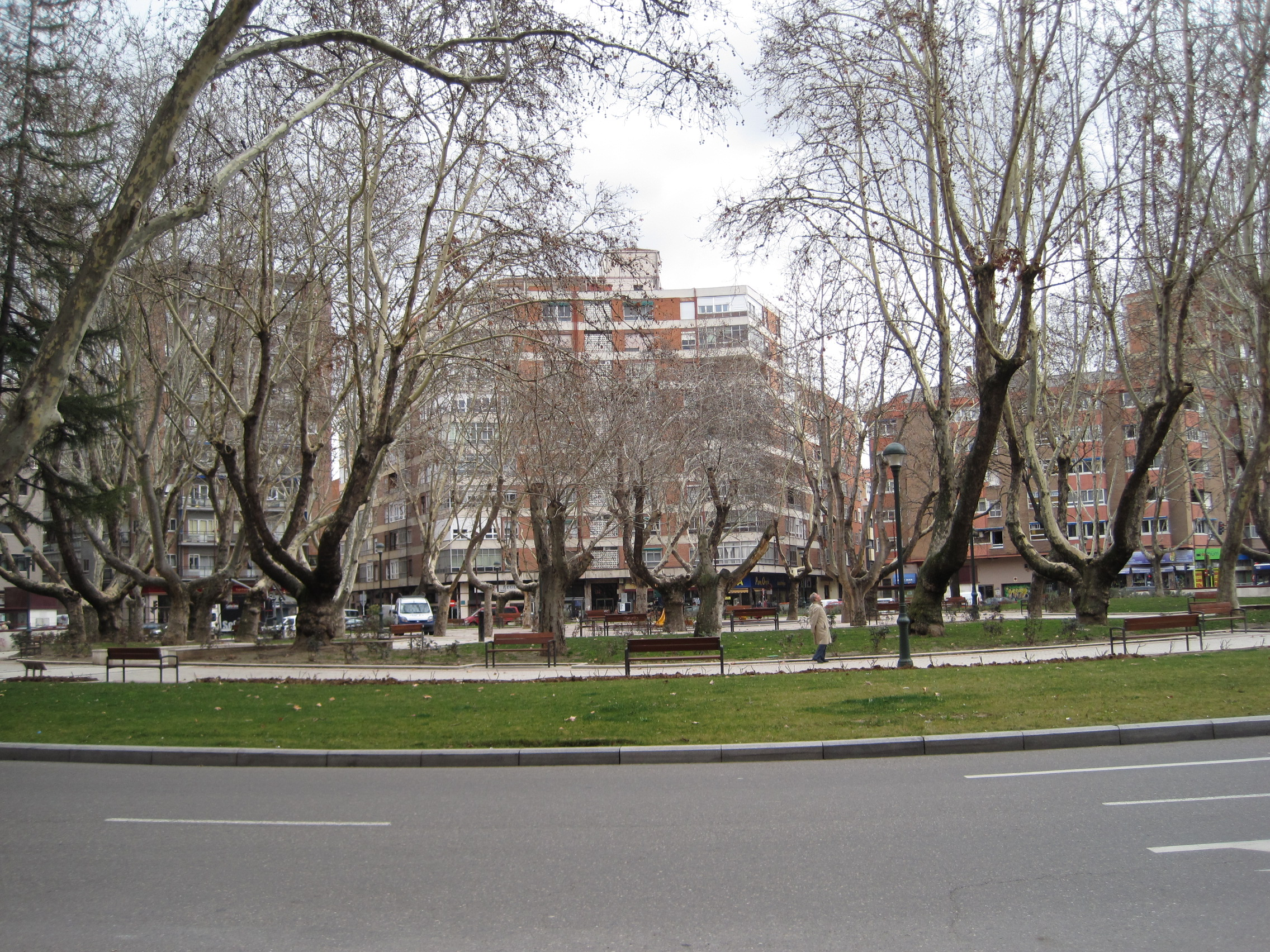 Vista de la plaza Circular de Valladolid (España).